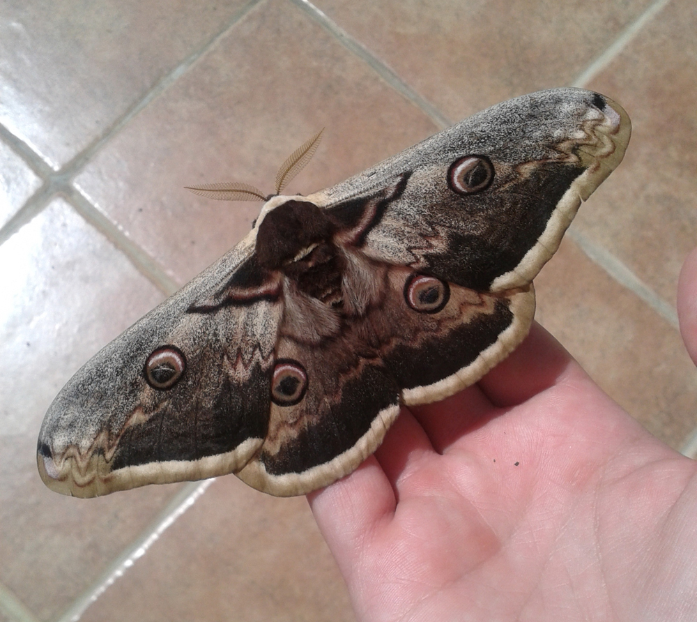 Ноћни лептир